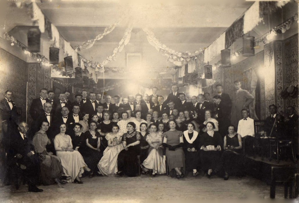 Korce.Pamje nga balloja e vitit 1938. Pjesemarres Kryetari Bashkise,Prefekti.Ne rradhen siper i treti majtas Xhavid Beli